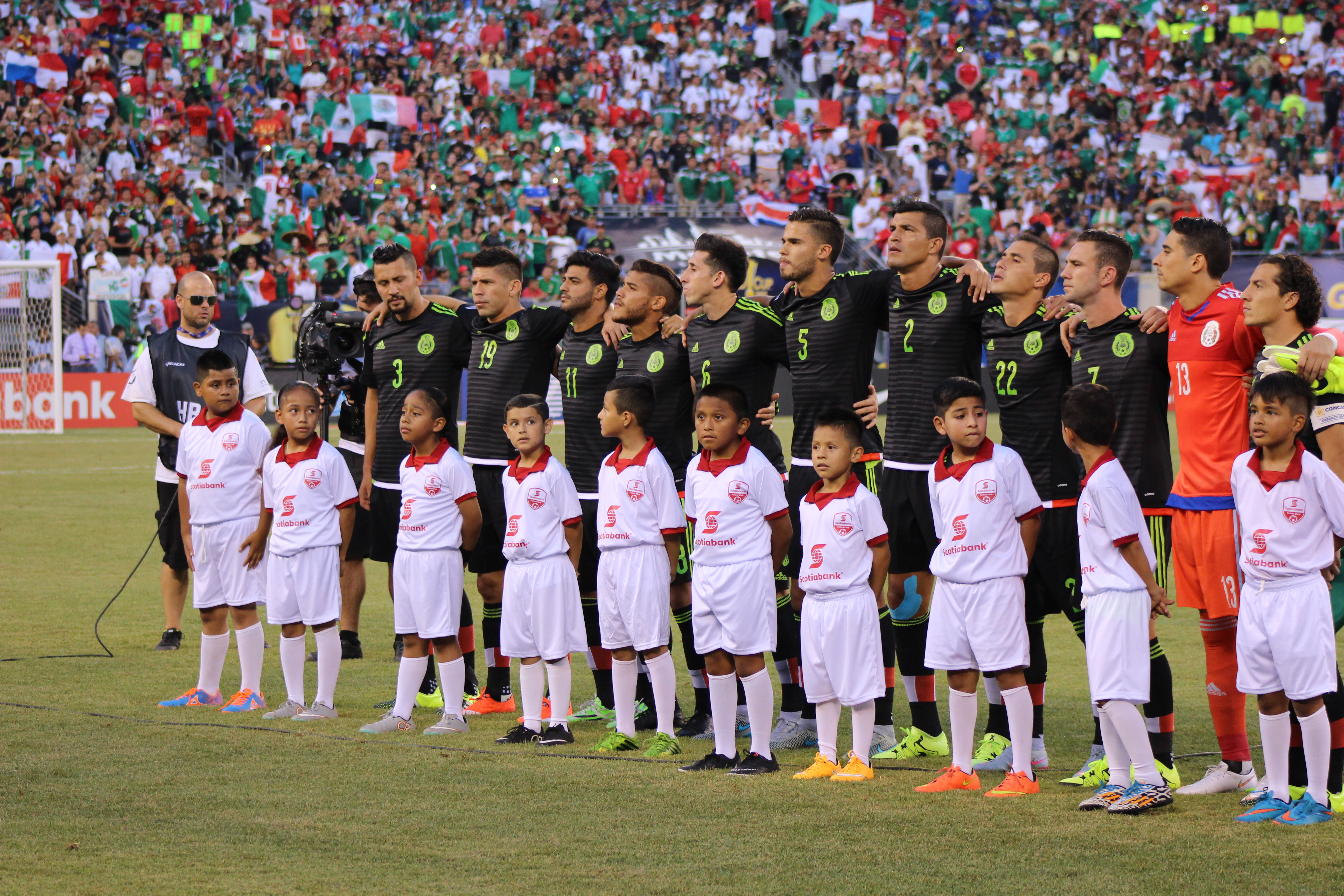 Mexico's Men's National Team